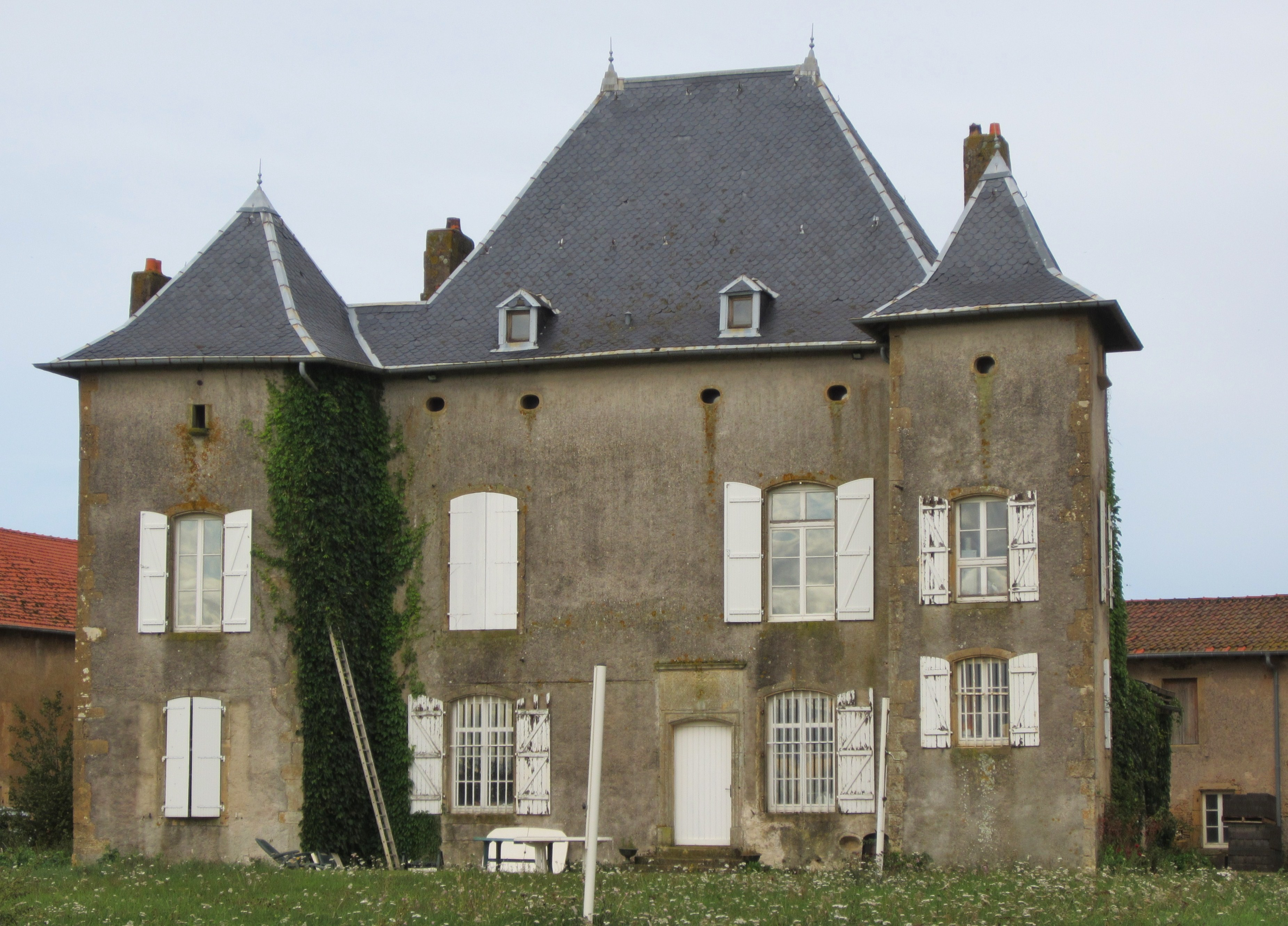 Description chateau bagneux Verneville Date12 September 2011Sourcemon appareil photoAuthorAimelaimePermission(Reusing this file) chateau bagneux Verneville